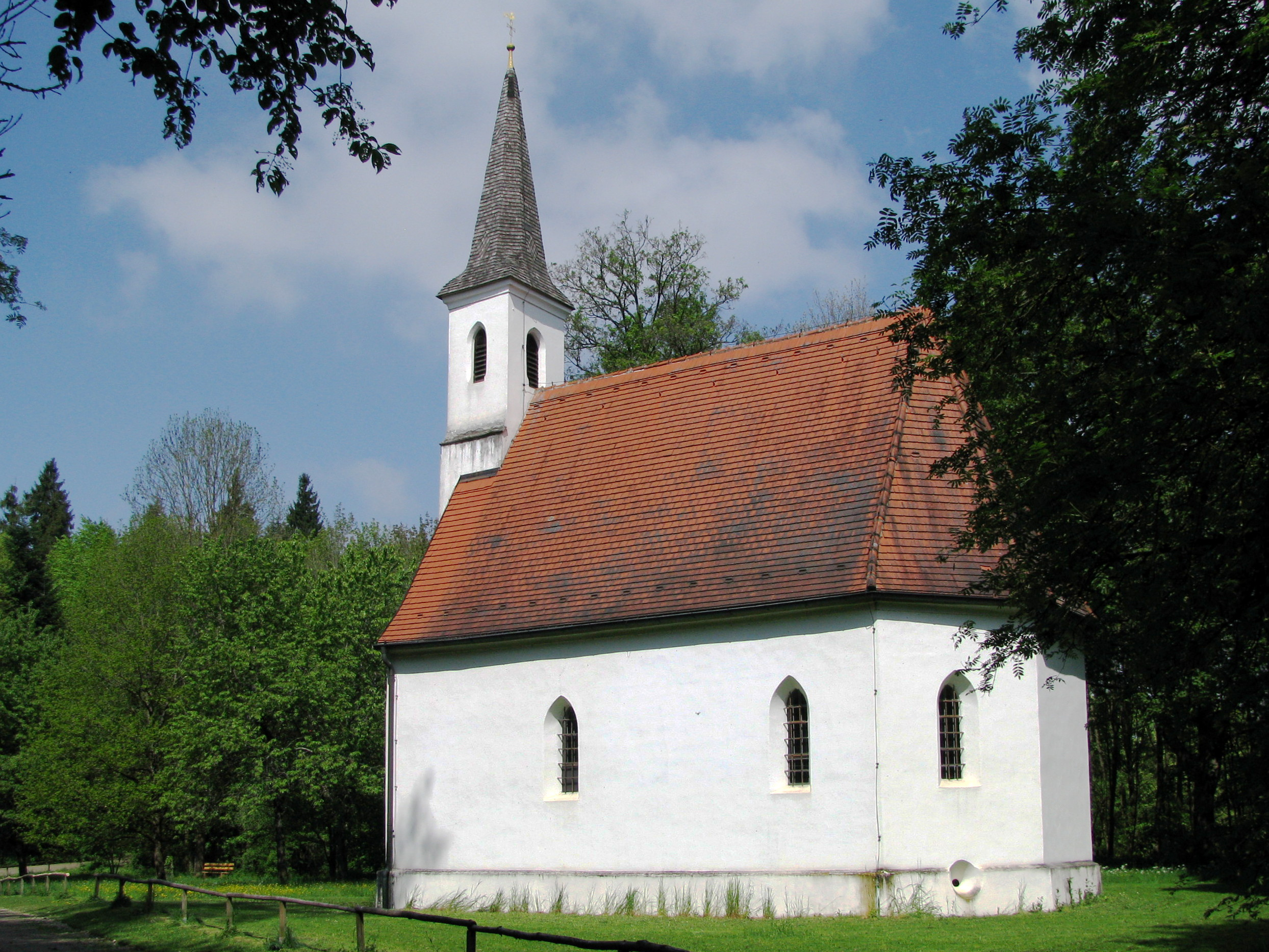 Kirche in Hampersberg (abgegangene Einöde) in der Gemeinde Erharting